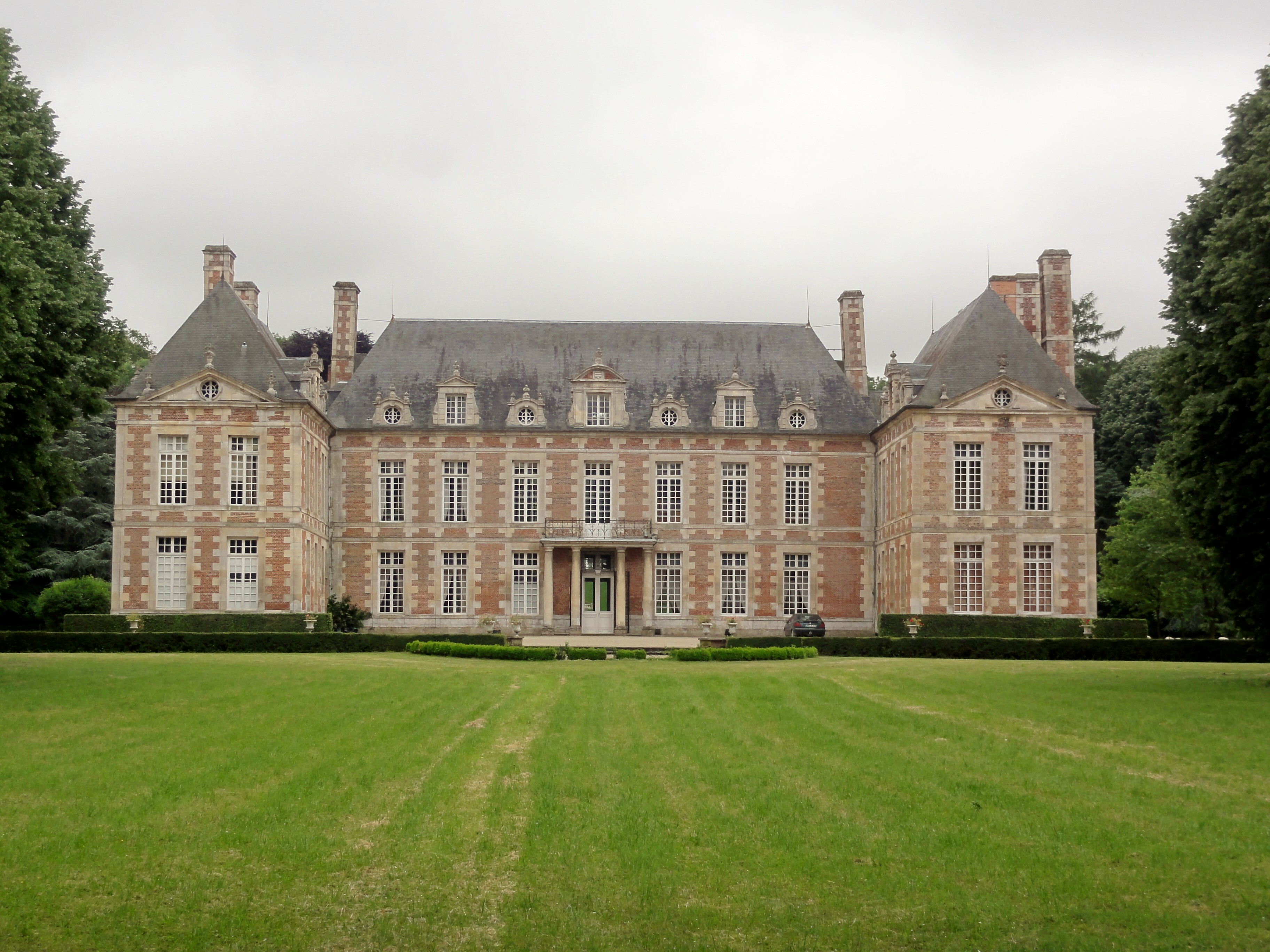 Le Fayel (Oise) Château, sa façade